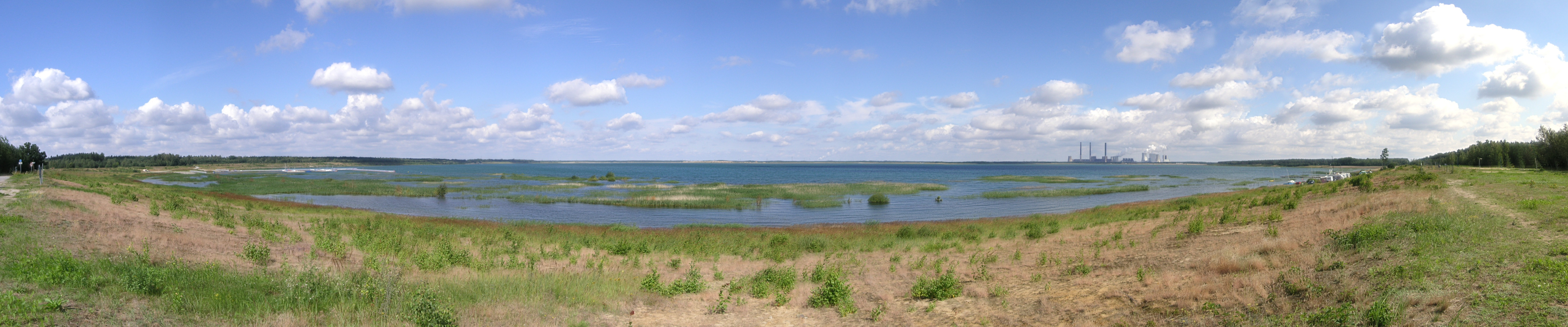 Panorama des Bärwalder Sees mit Blick auf das Kraftwerk Boxberg